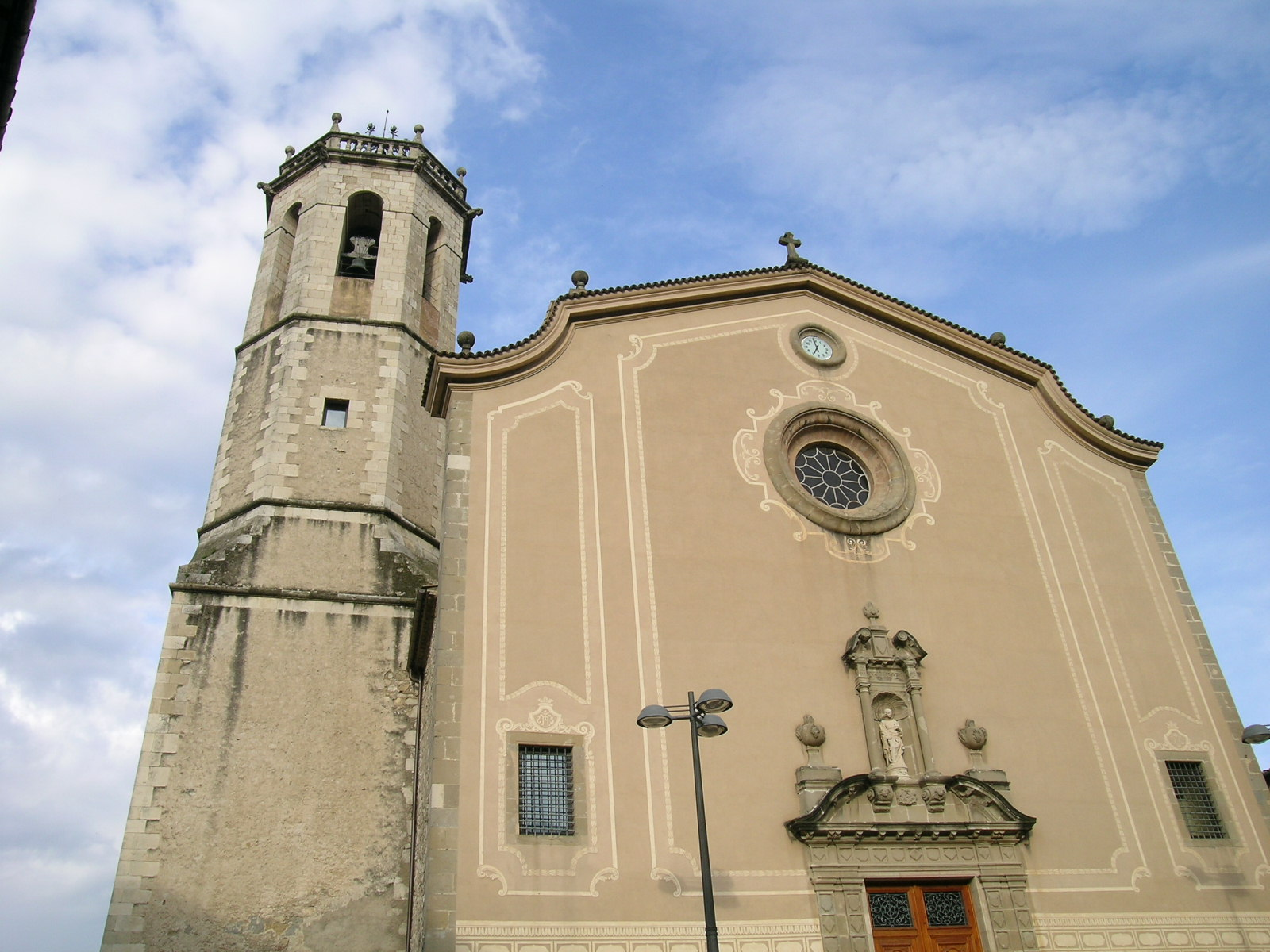 Esglesia de Sta Coloma de Centelles